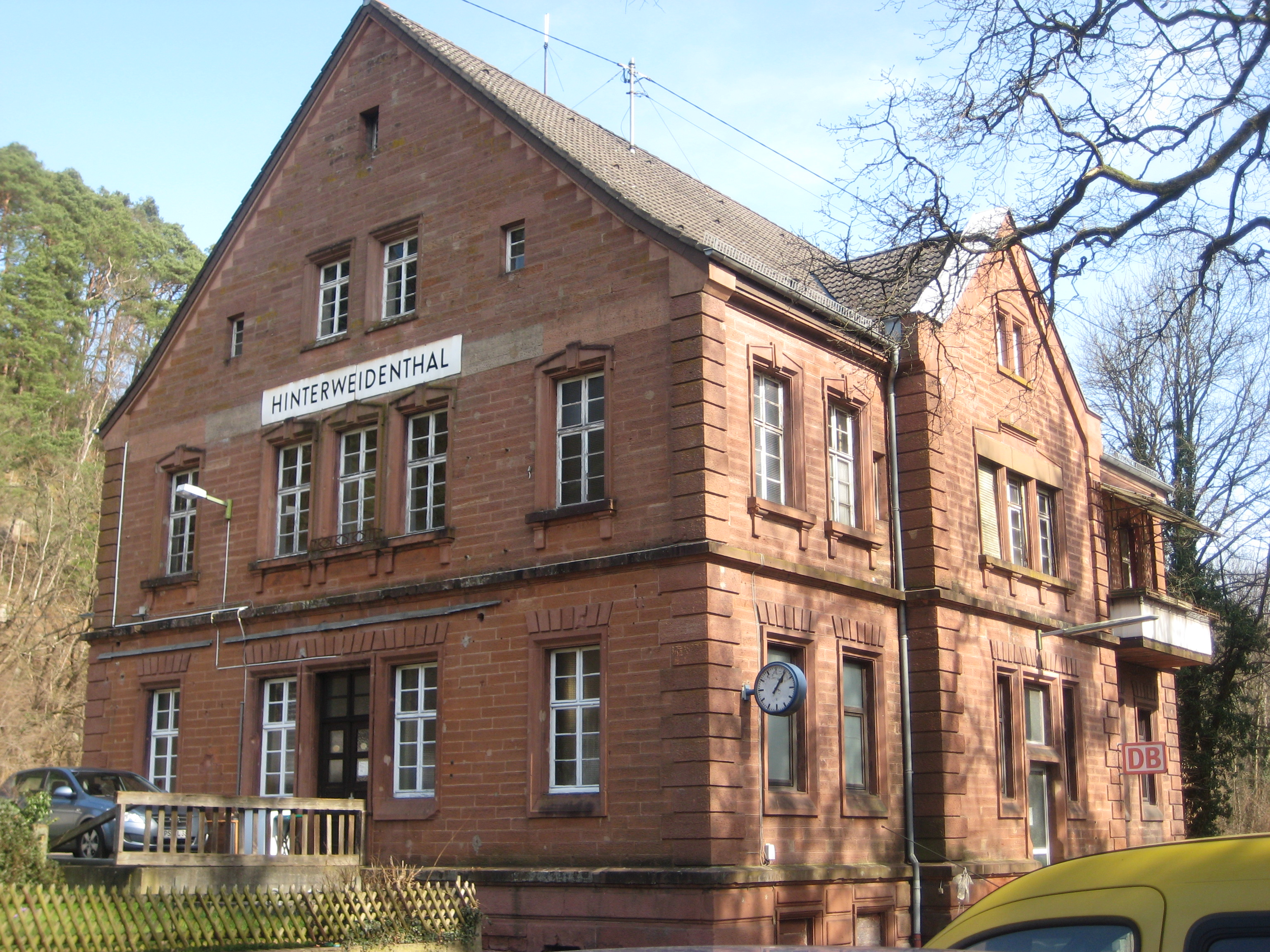 Bahnhofsgebäude Hinterweidenthal